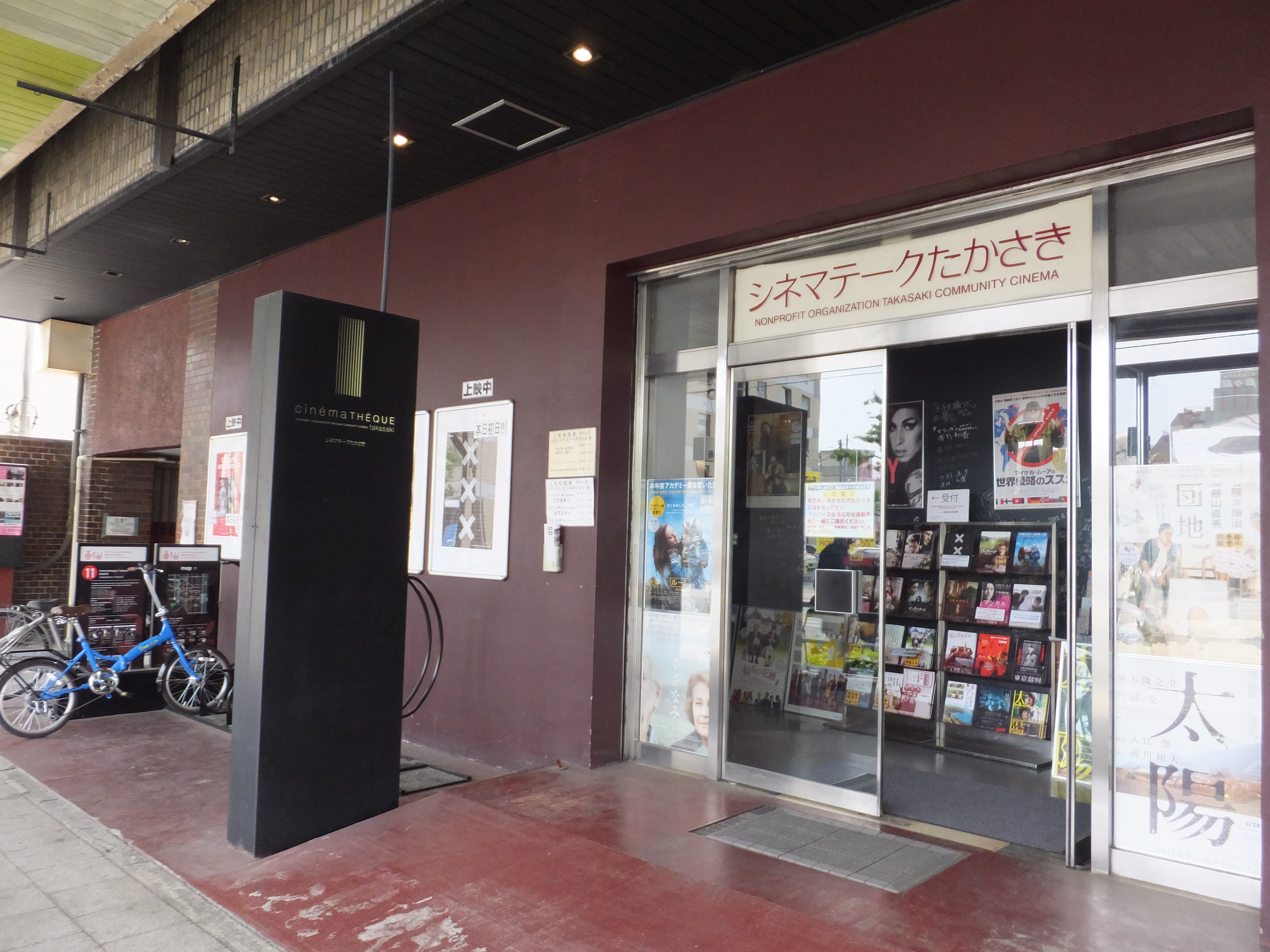 シネマテーク高崎の1階部分。